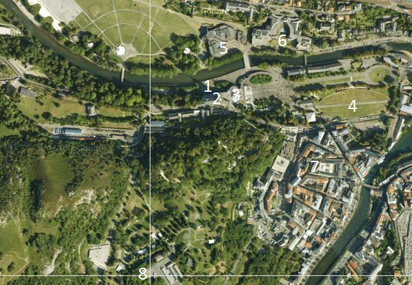 Vue aérienne de Lourdes (à légender)